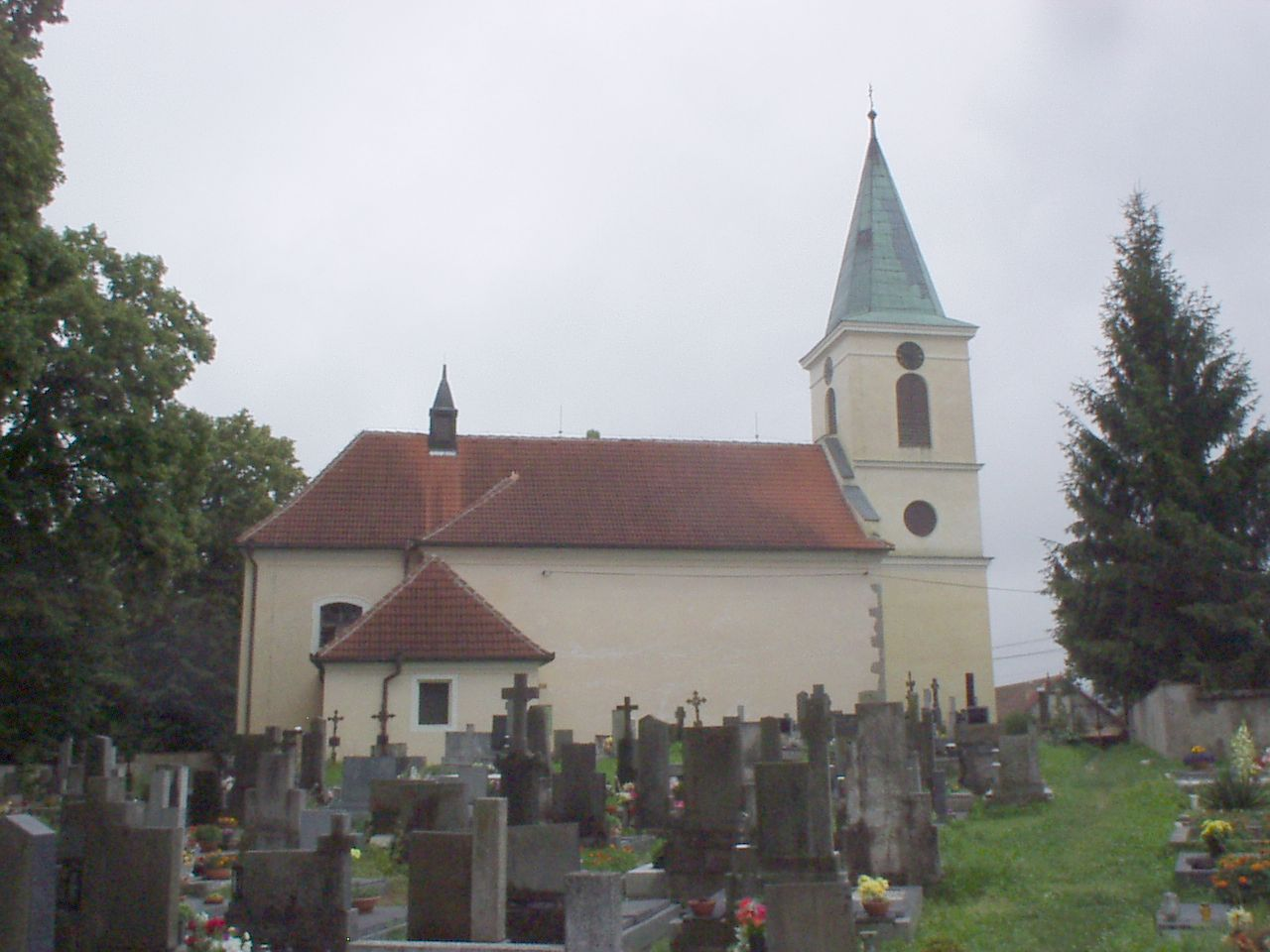 kostel Nejsvětější Trojice v Černívsku od severozápadu